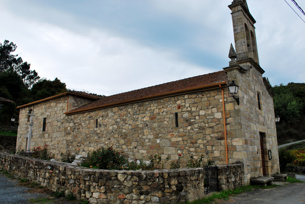 Igrexa de Moreda Monforte de Lemos Lugo.